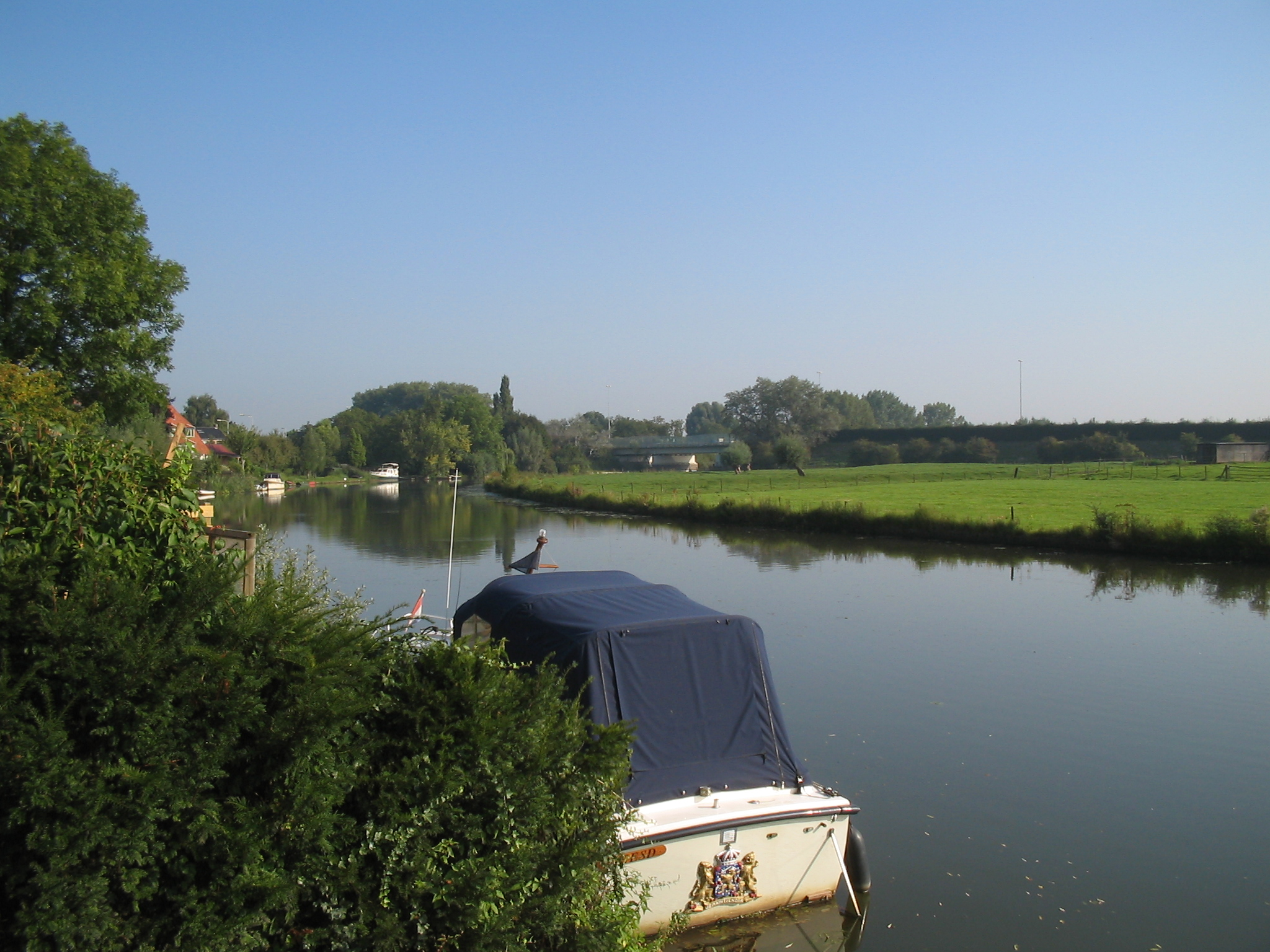 village Beesd, Netherlands